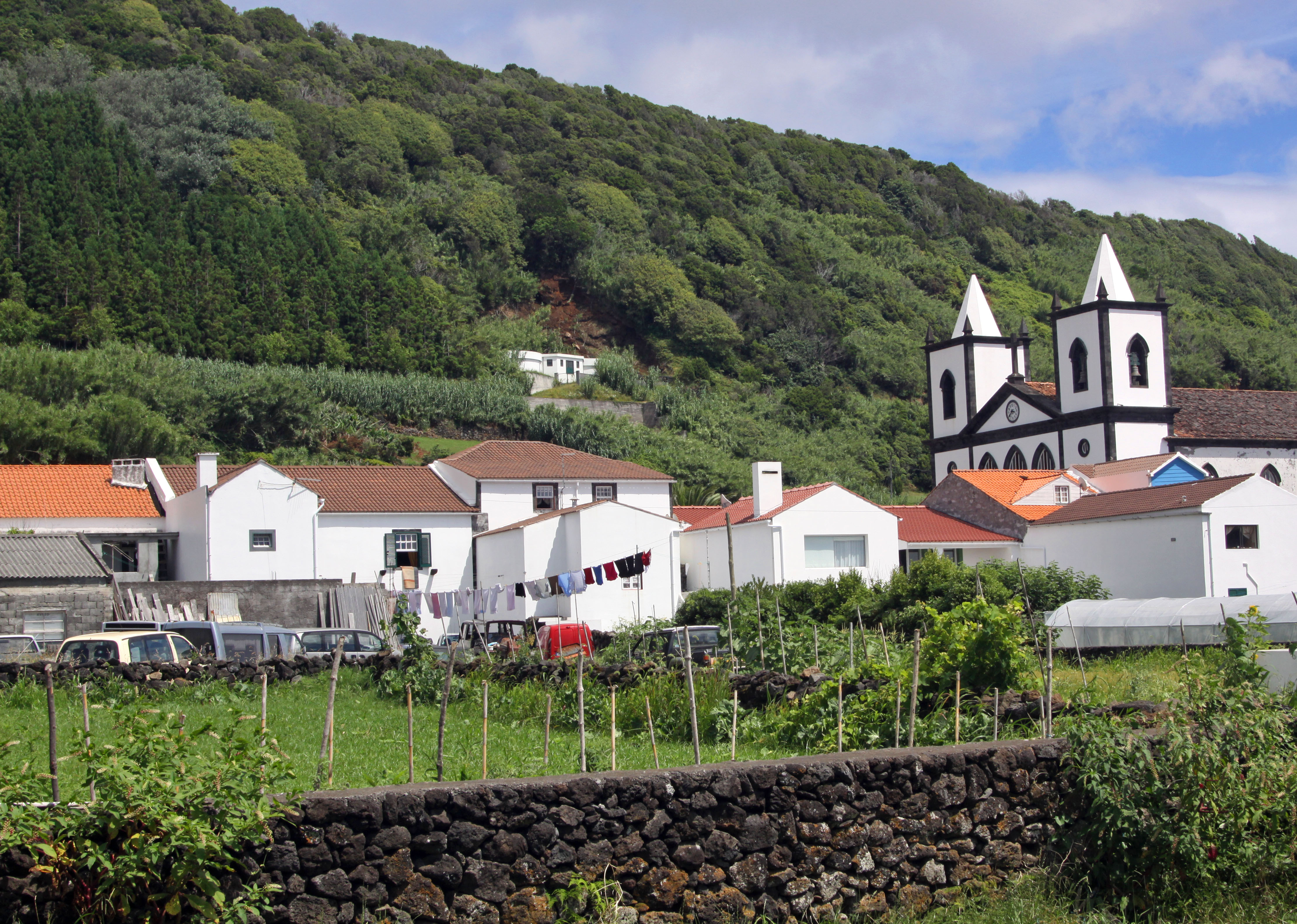 Ilha do Pico, Açores. L'église de Lajes do Pico.